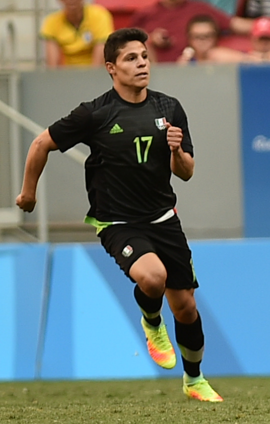 Estádio Nacional de Brasília Mané Garrincha, Brasília, DF, Brasil, 10/8/2016 Foto: Andre Borges/Agência Brasília Coréia do Sul e México jogam nesta quarta-feira (10), no Estádio Mané Garrincha, pelo grupo C do futebol masculino nas Olimpíadas 2016.